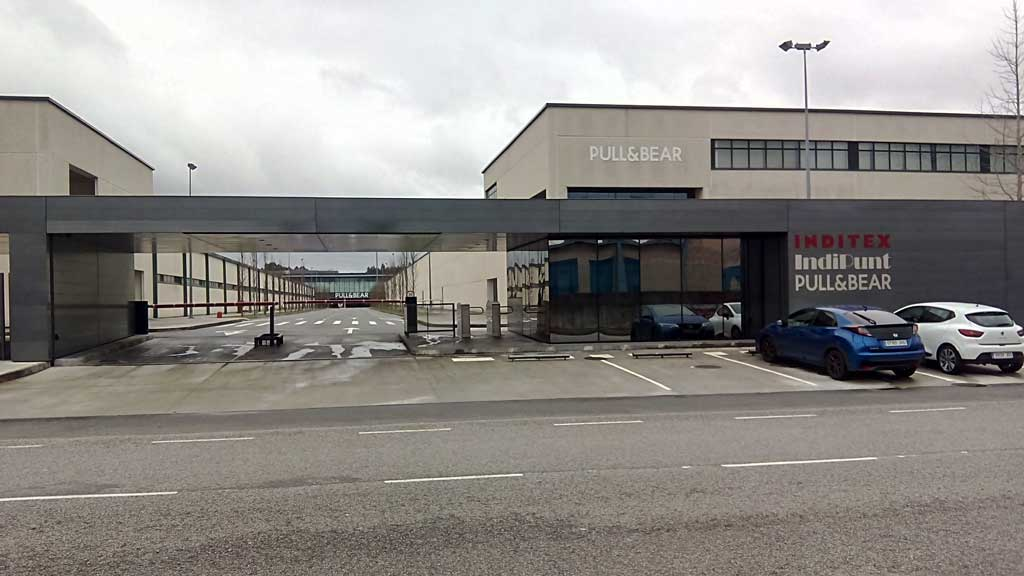 Acceso a Pull&Bear en Río do Pozo, Narón.